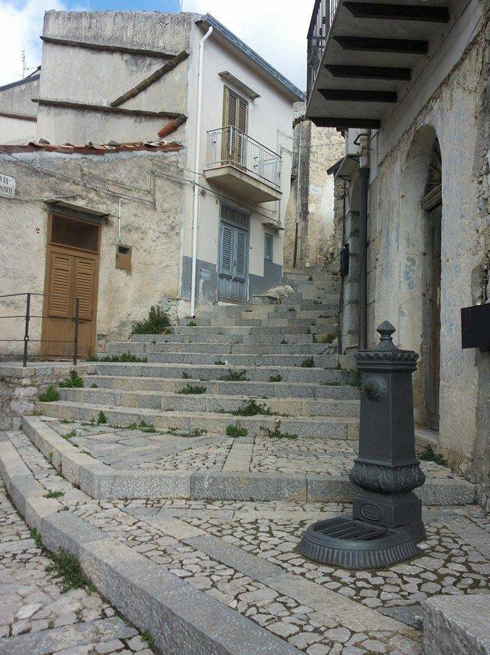 Via Papajani (dall'albanese lett. "Sacerdote Giovanni"), direzione Via Vicario, quartiere Sheshi, Piana degli Albanesi (PA).